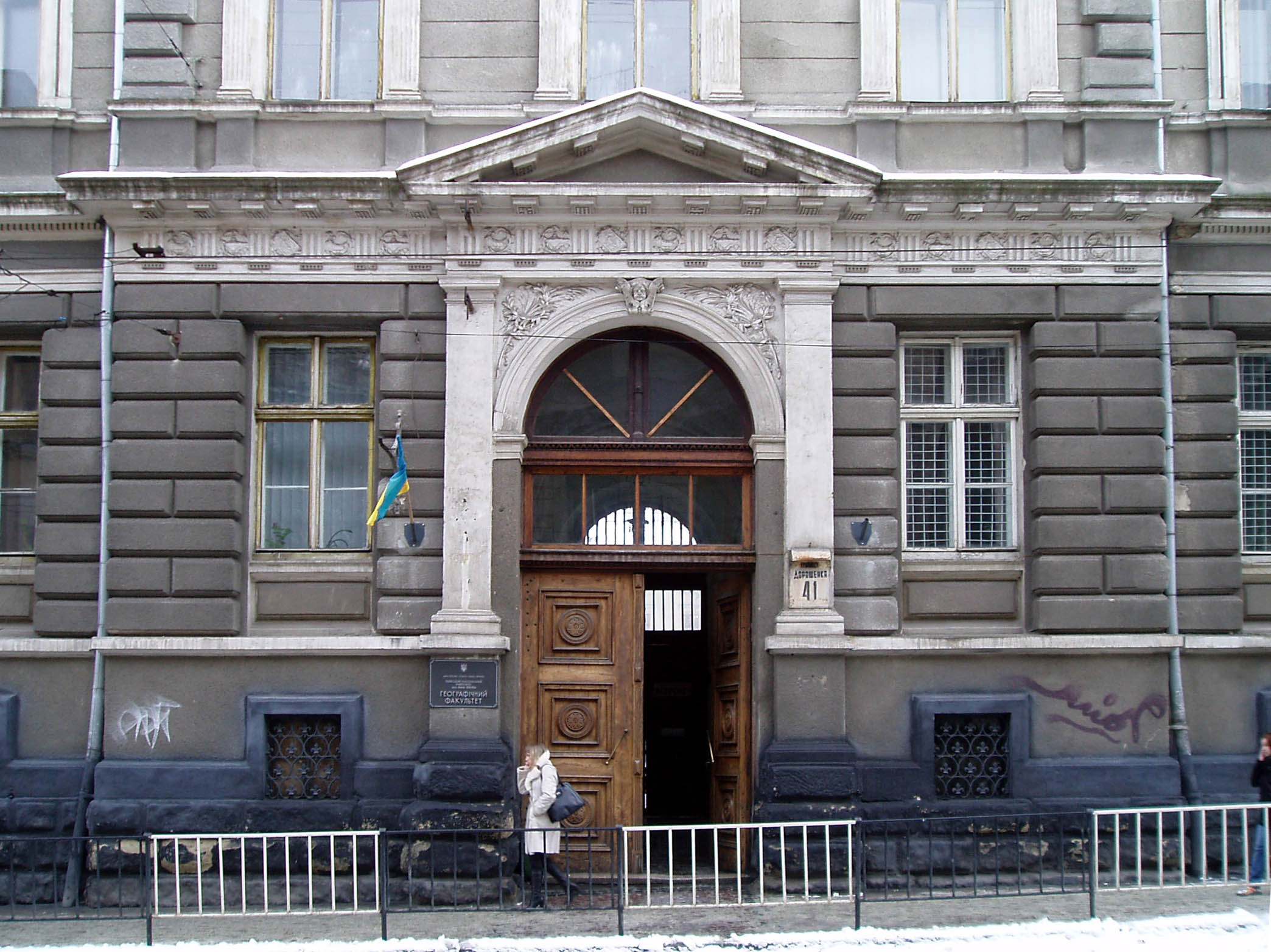 Портал будинку кінця 19 століття на вулиці Дорошенка, 41 у Львові. Збудованого за проектом Сильвестра Гавришкевича (1833—1911)